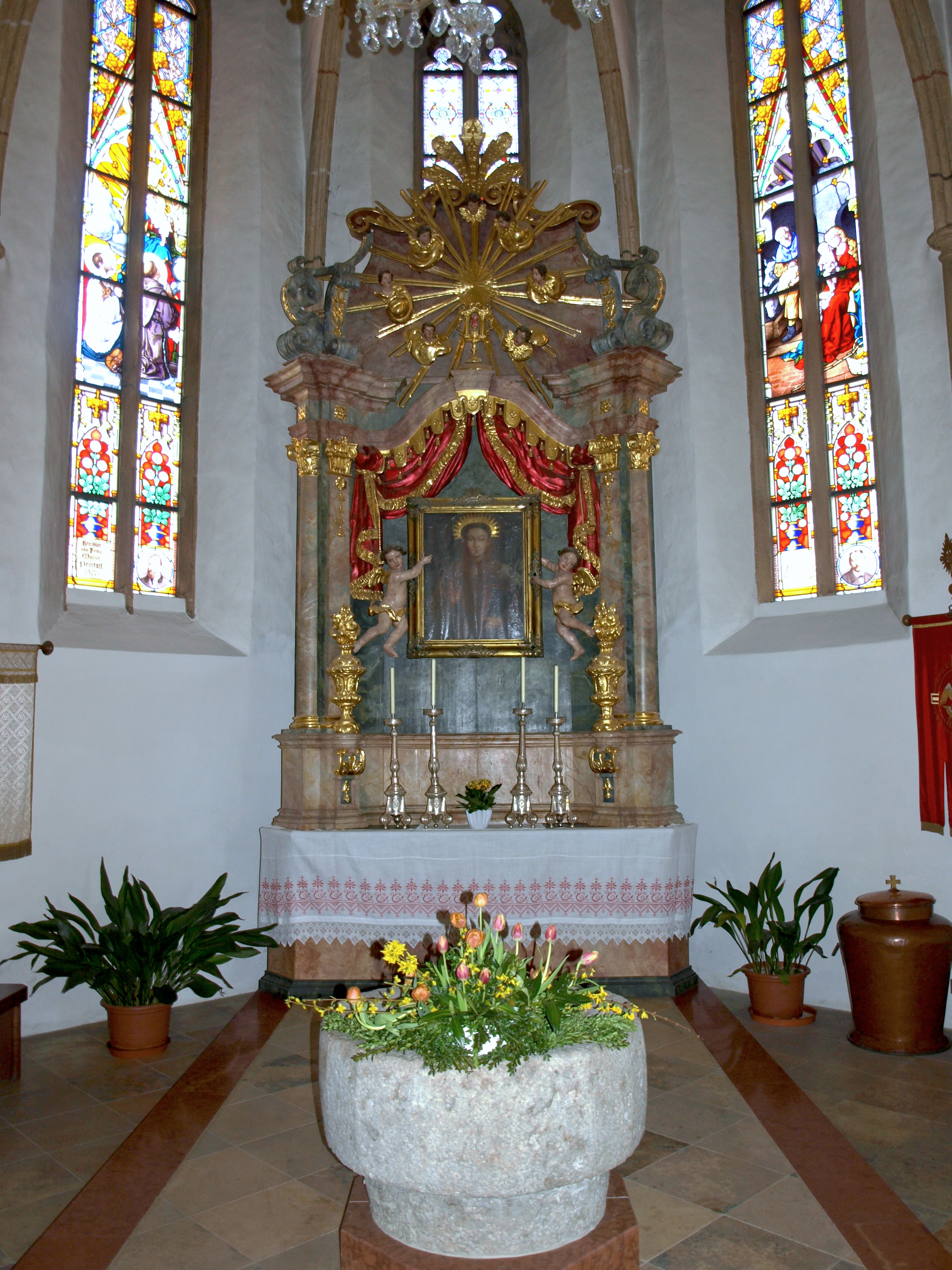 Kath. Pfarrkirche hl. Nikolaus, Taufkapelle, Bild des Hl. Antonius von Padua